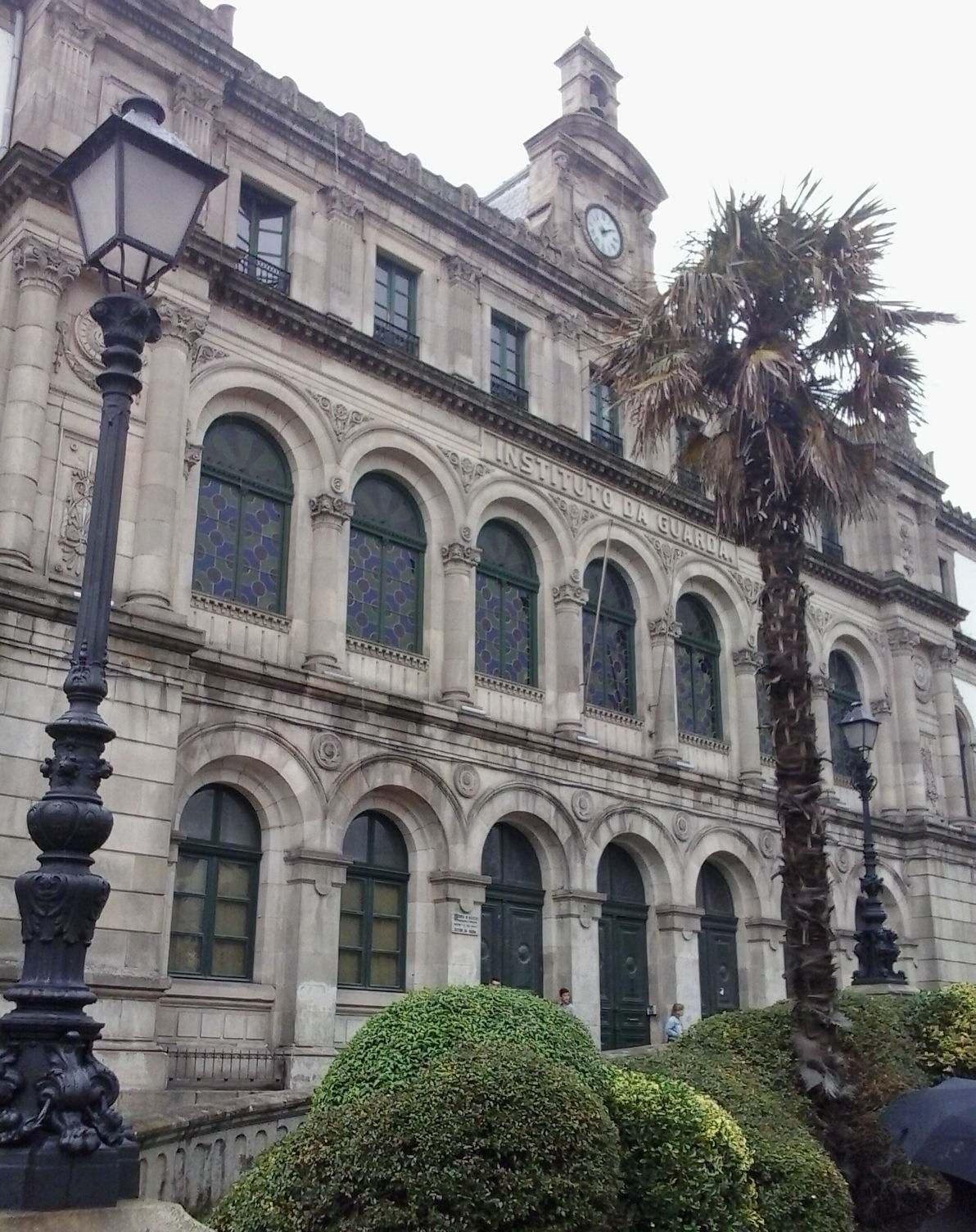 Instituto de Ensino Eusebio da Guarda, A Coruña Galiza Spain